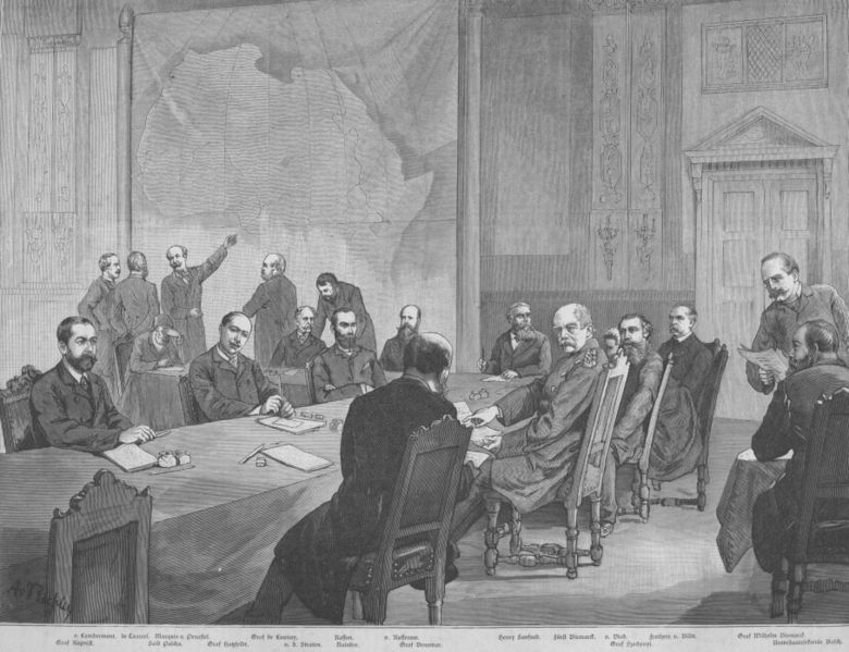 Éscene de la Conference de Berlin